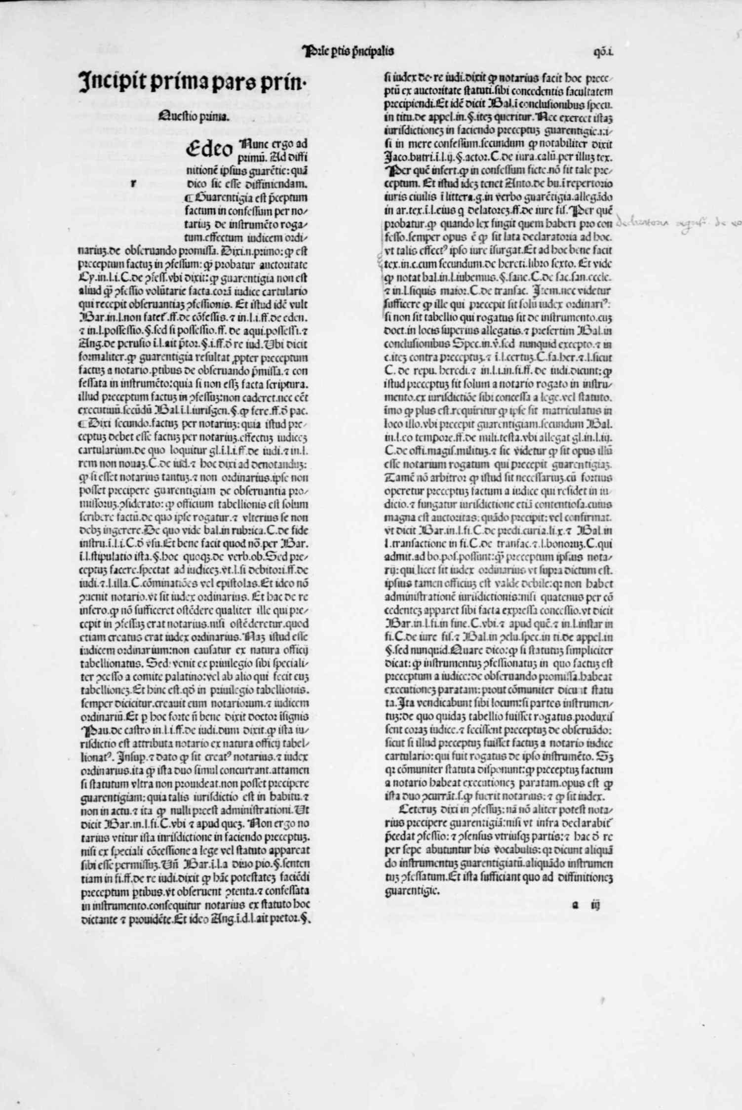 Carta a3r